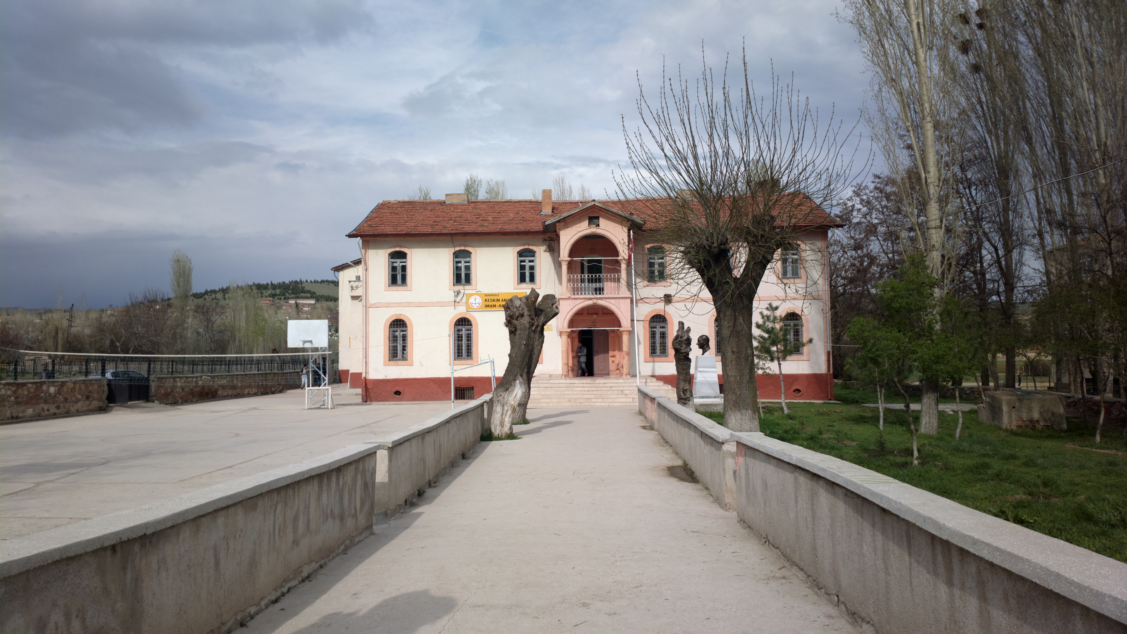 Keskin İmam Hatip Lisesi